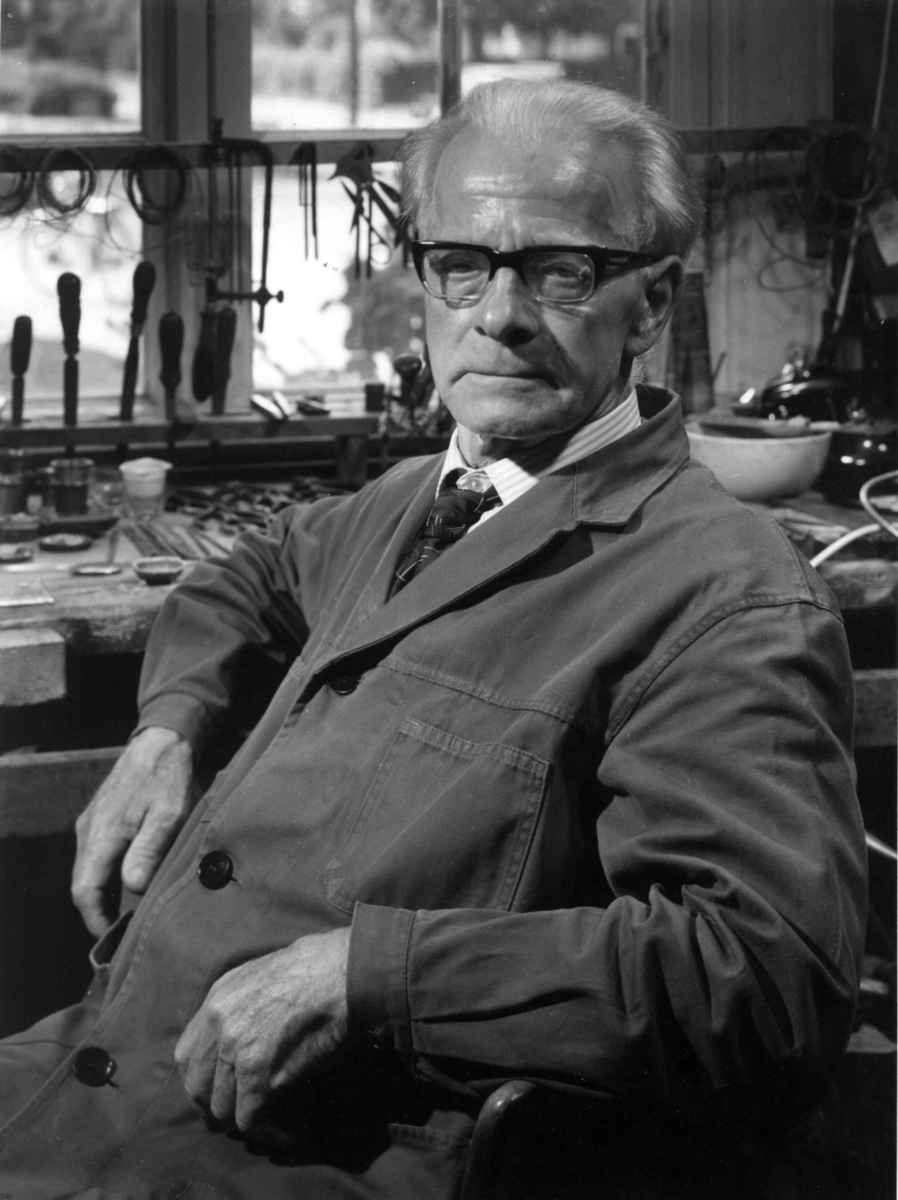 Eivind G. Tveiten i verkstedete på Dalen i Tokke. Foto Sjur Fedje / Norsk Folkemuseum.